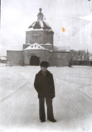 Церковь в с. Дячкино Тарасовского района Ростовской области